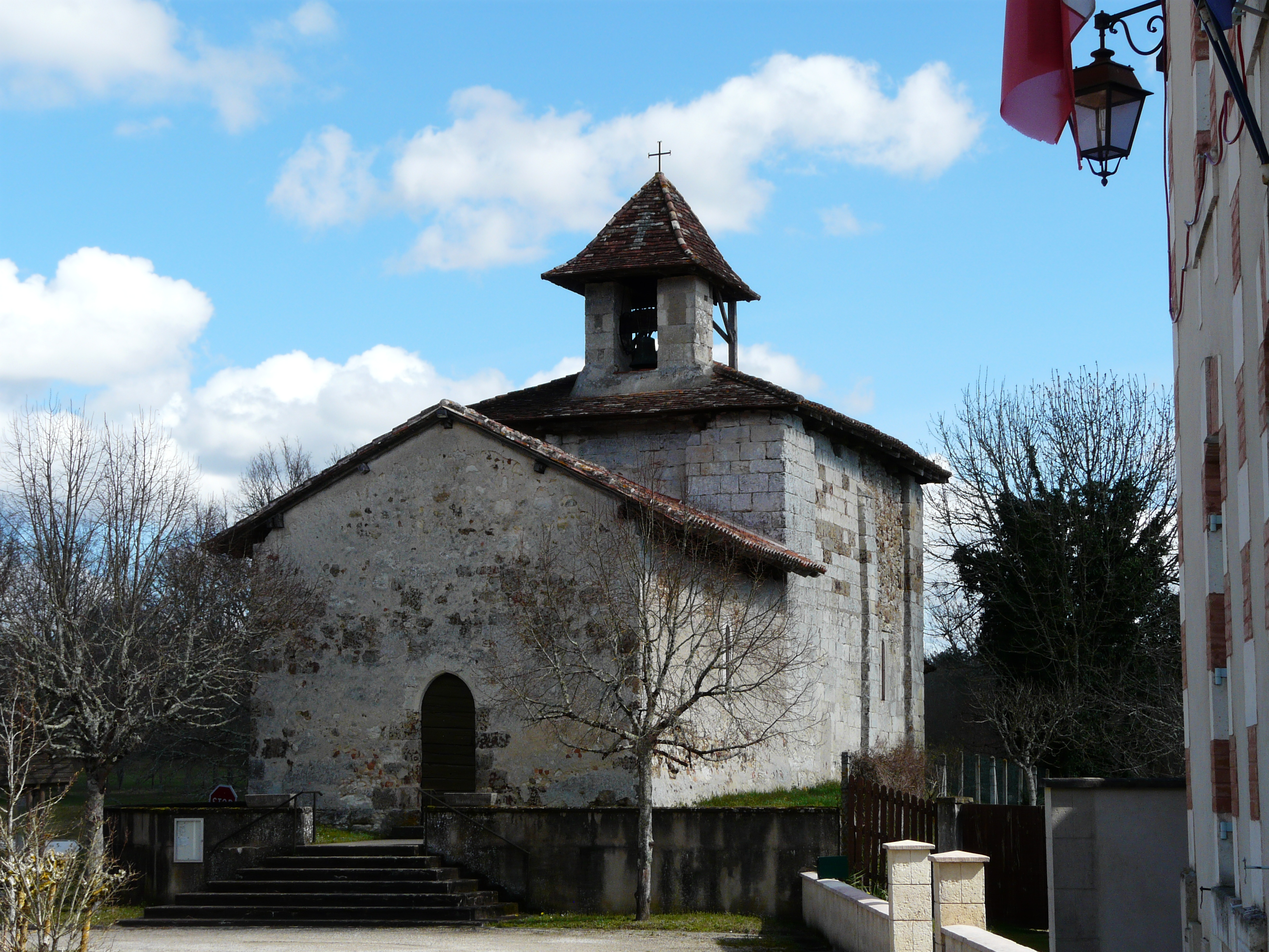 L'angle sud-ouest de l'église Saint-Jean-Baptiste de Saint-Jean-d'Ataux, Dordogne, France.